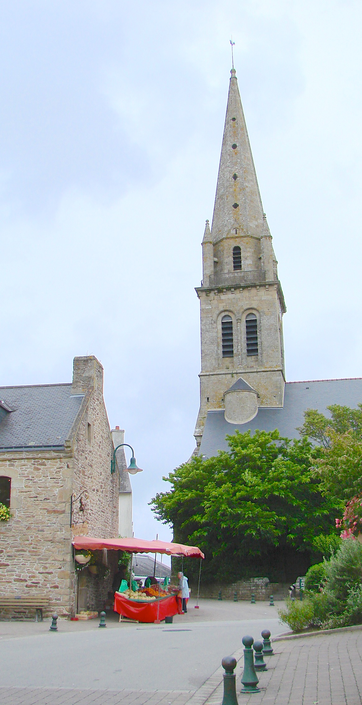 Eglise St-Pierre,à Baden, dans le Morbihan.(Bretagne, France)